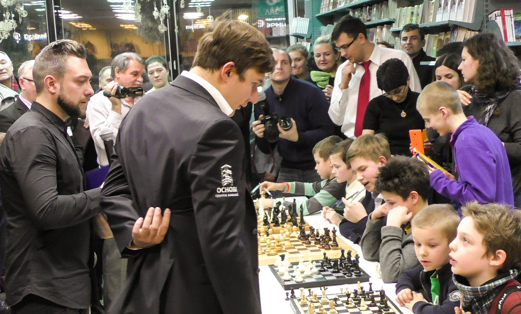 02.02.2017. Сергей Карякин в Московском Доме Книги.